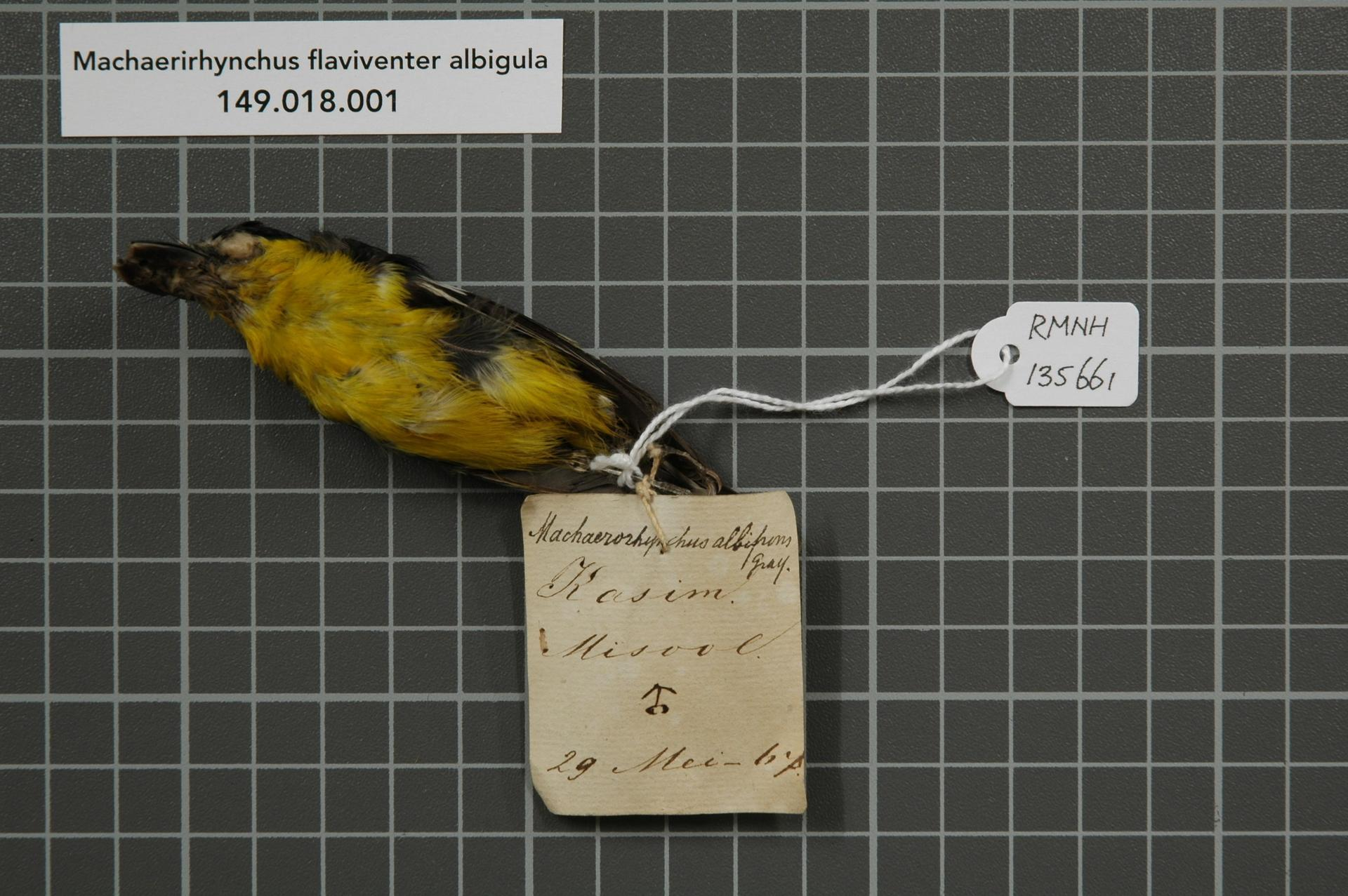 Machaerirhynchus flaviventer albigula Mayr & Meyer de Schauensee, 1939